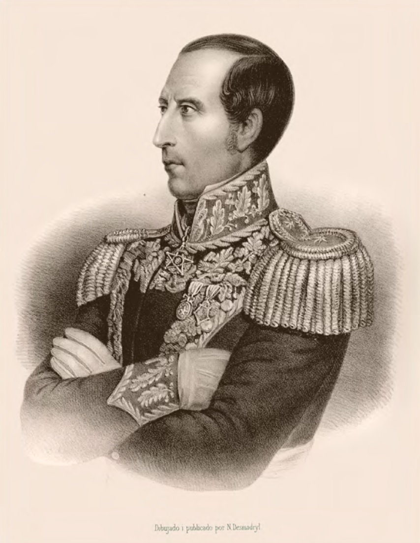 José Ignacio Zenteno (Santiago, 28 de julio de 1786 - Santiago, 16 de julio de 1847) fue Ministro de Guerra y Marina de Bernardo O’Higgins.